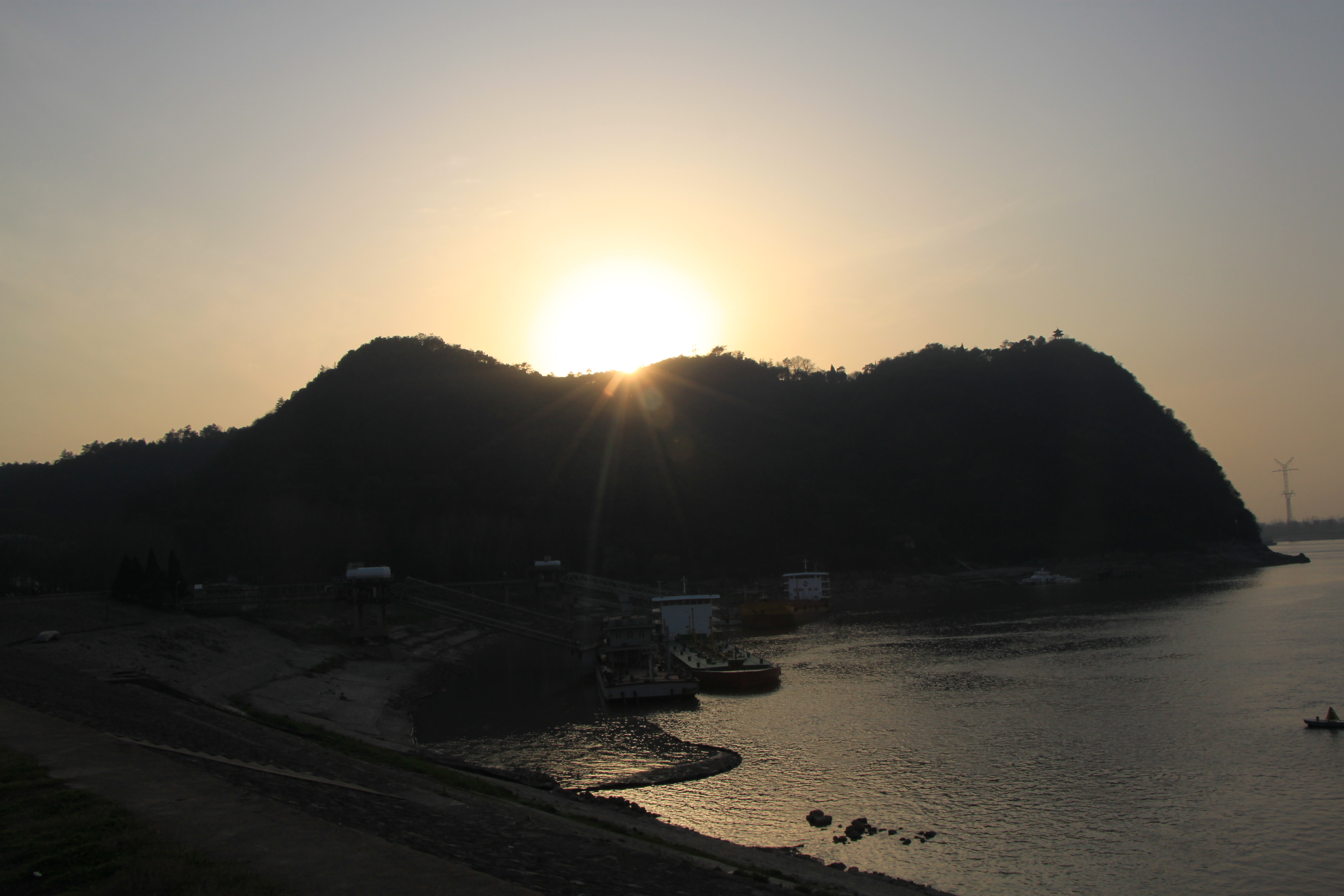 中文（中国大陆）: 湖北省黄石市西塞山